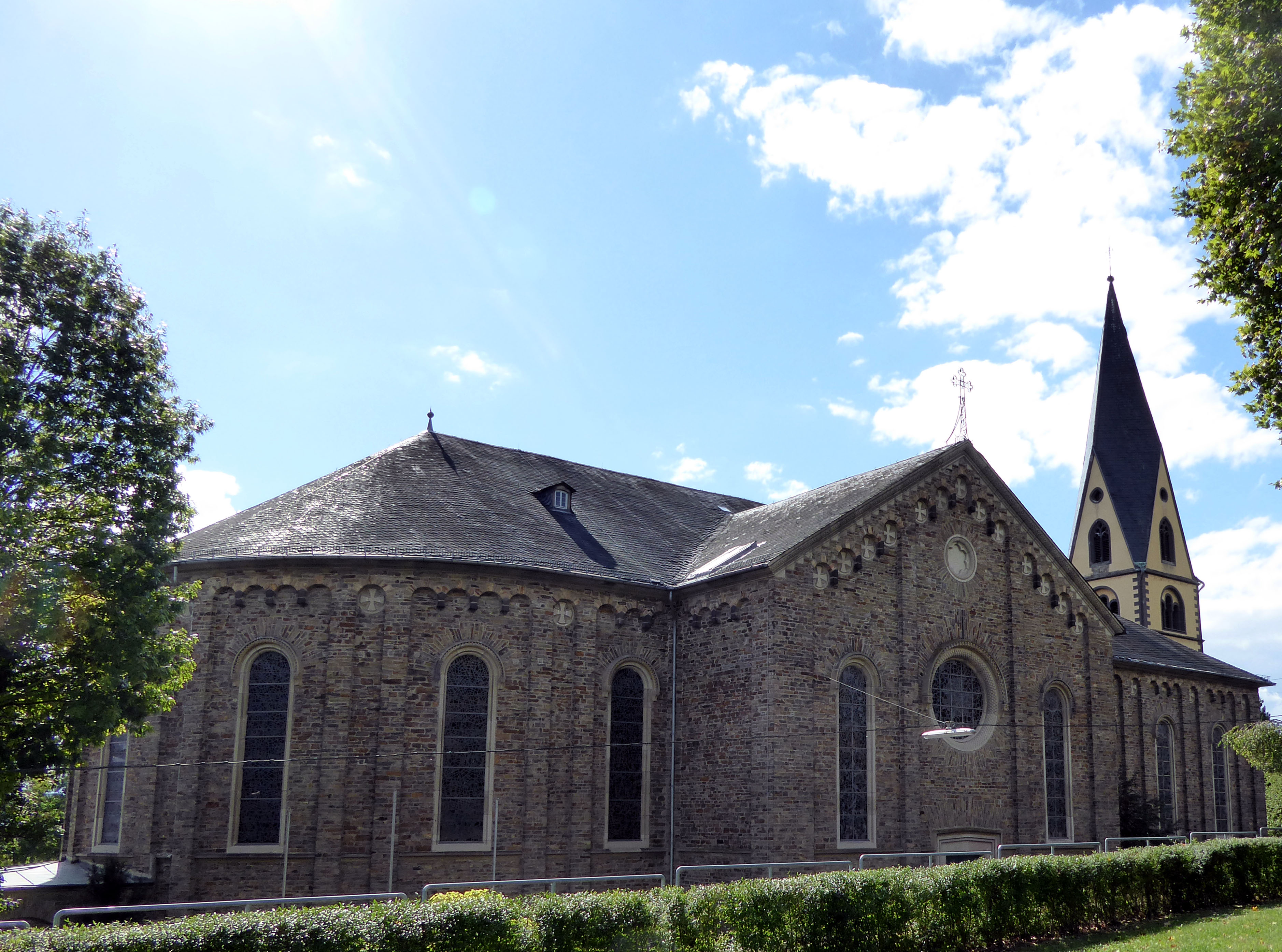 Vallendar (Rhein), spätgotischer Westturm, vor 1501, dreischiffige neuromanische Hallenkirche, 1837–41, Architekt Johann Claudius von Lassaulx, Koblenz; Gesamtanlage mit Treppe und Park